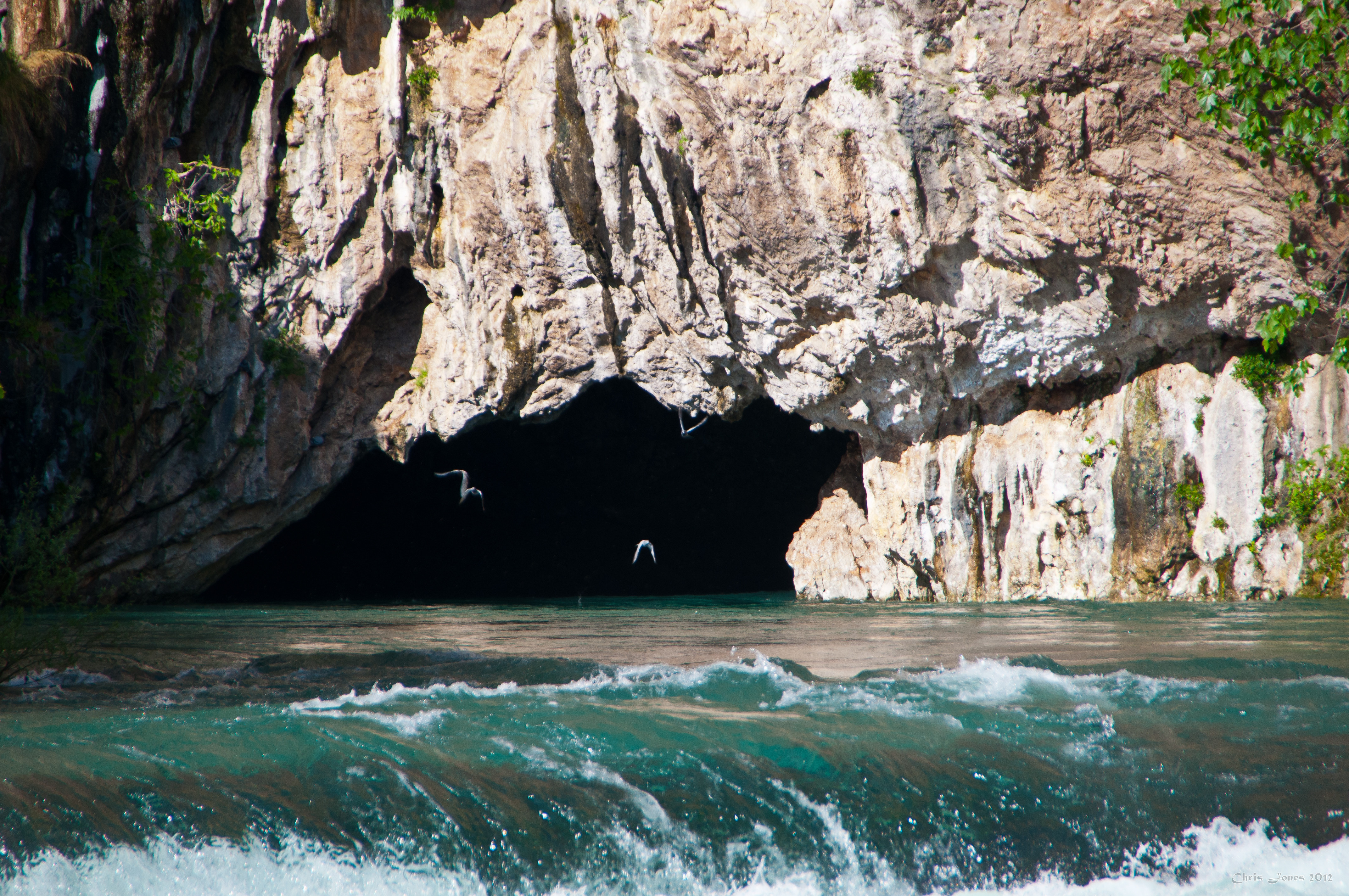 Mostar - Buna River spring